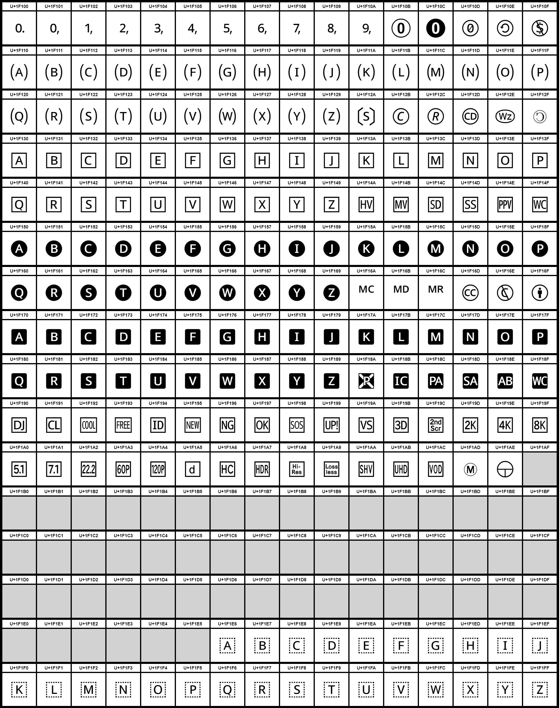 Grafiktafel für den Unicodeblock Zusätzliche umschlossene alphanumerische Zeichen. Schraffierte Felder sind unbesetzte Codepoints.